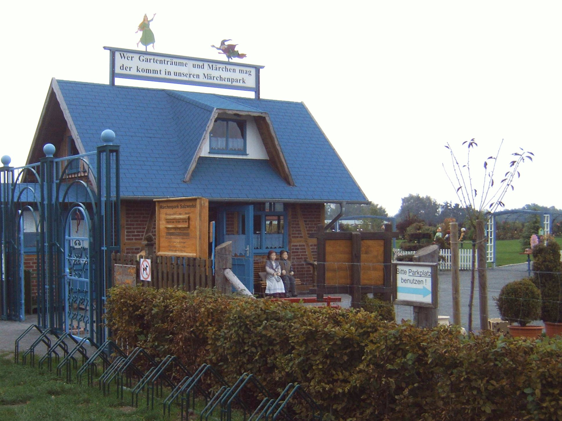 Eingang zum Märchenpark Salzwedel, Sachsen-Anhalt, Deutschland